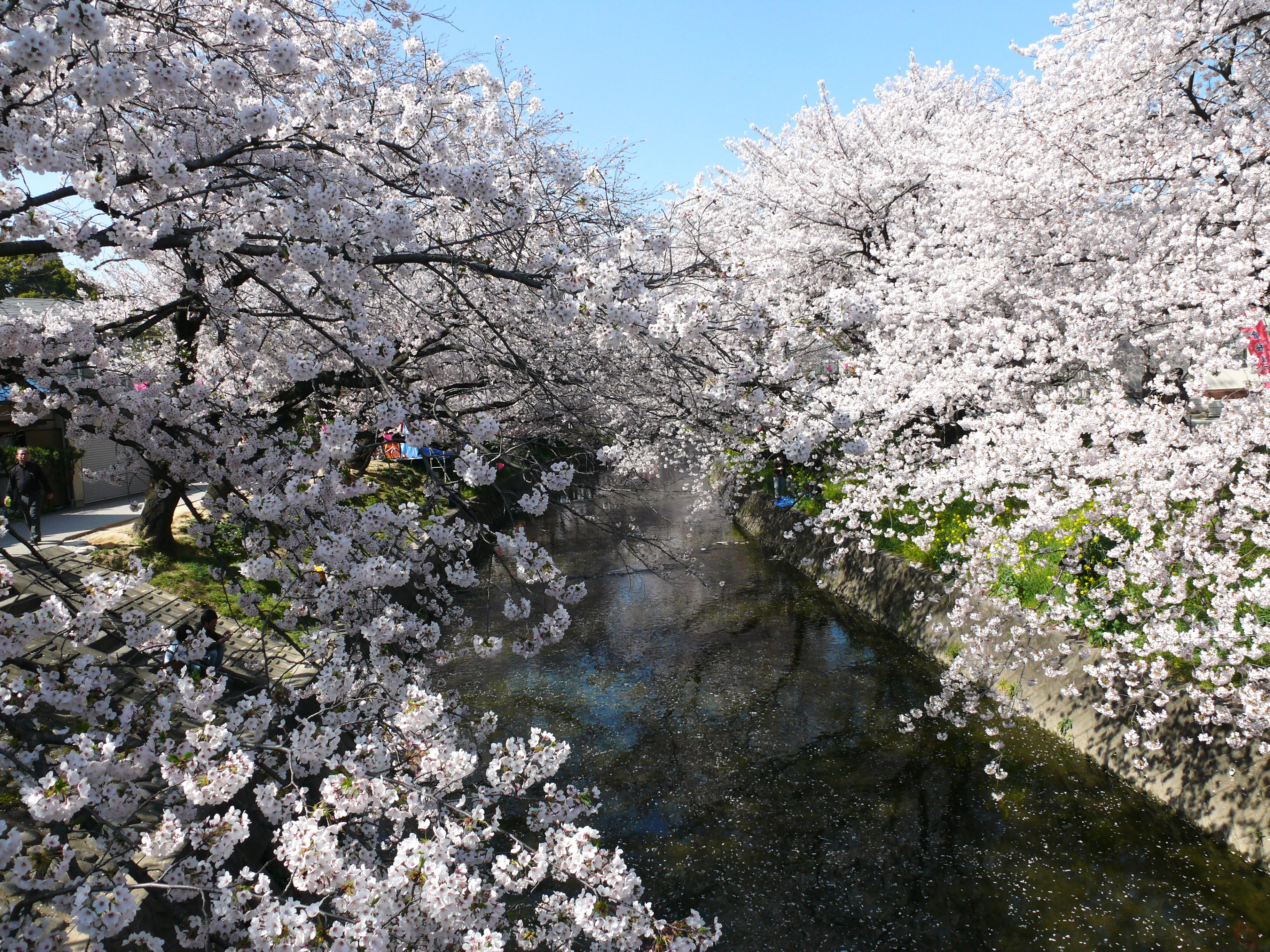 日本の愛知県岩倉市一豊橋付近の五条川